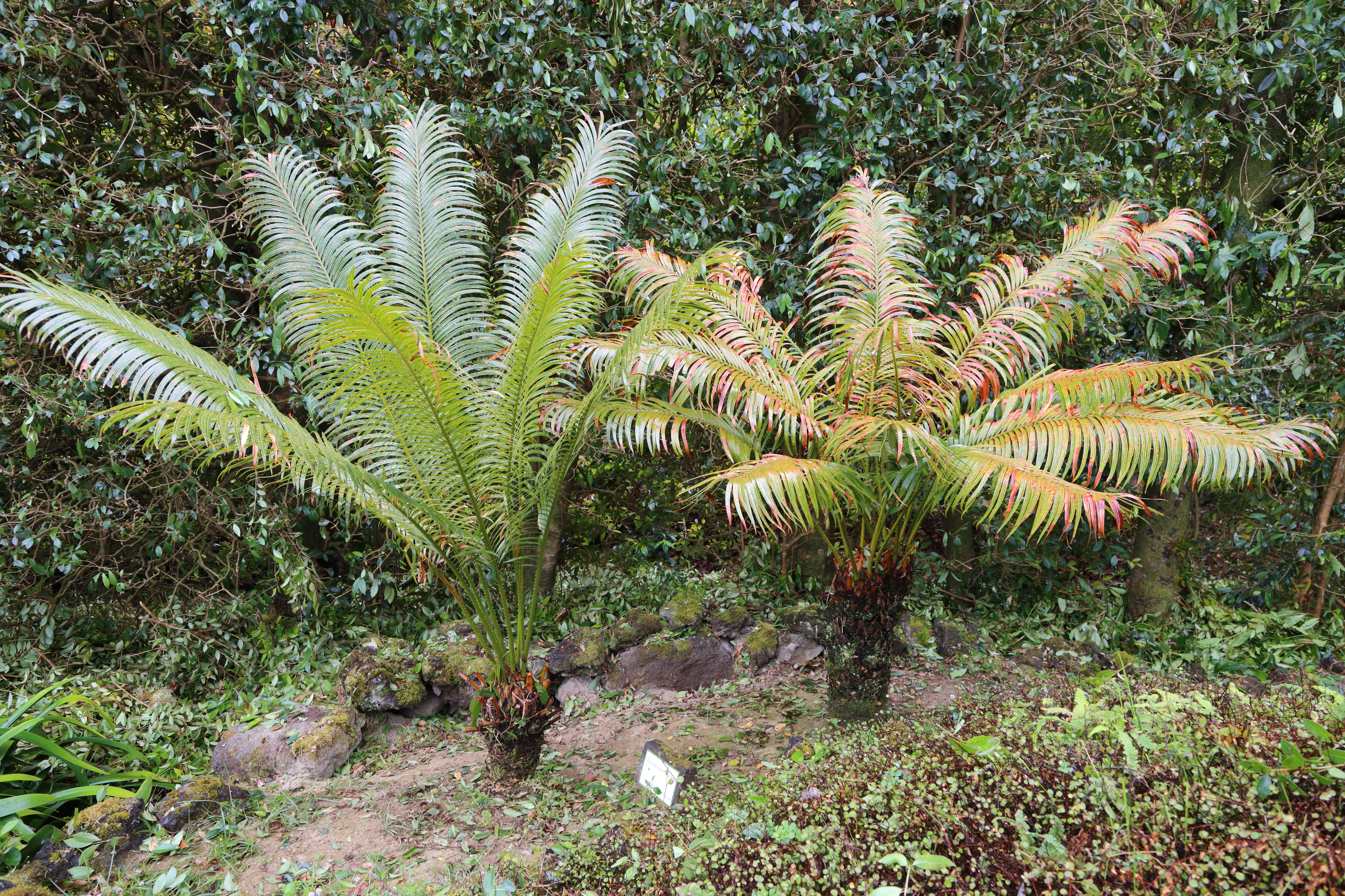 Cycas bougainvilleana i parken Terra Nostra, Furnas, Azorerna.